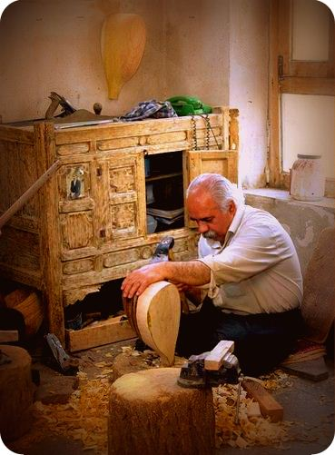 استاد اسدالله فرمانی زبردست ترین سازنده تنبور در شهر گهاره ساکن است